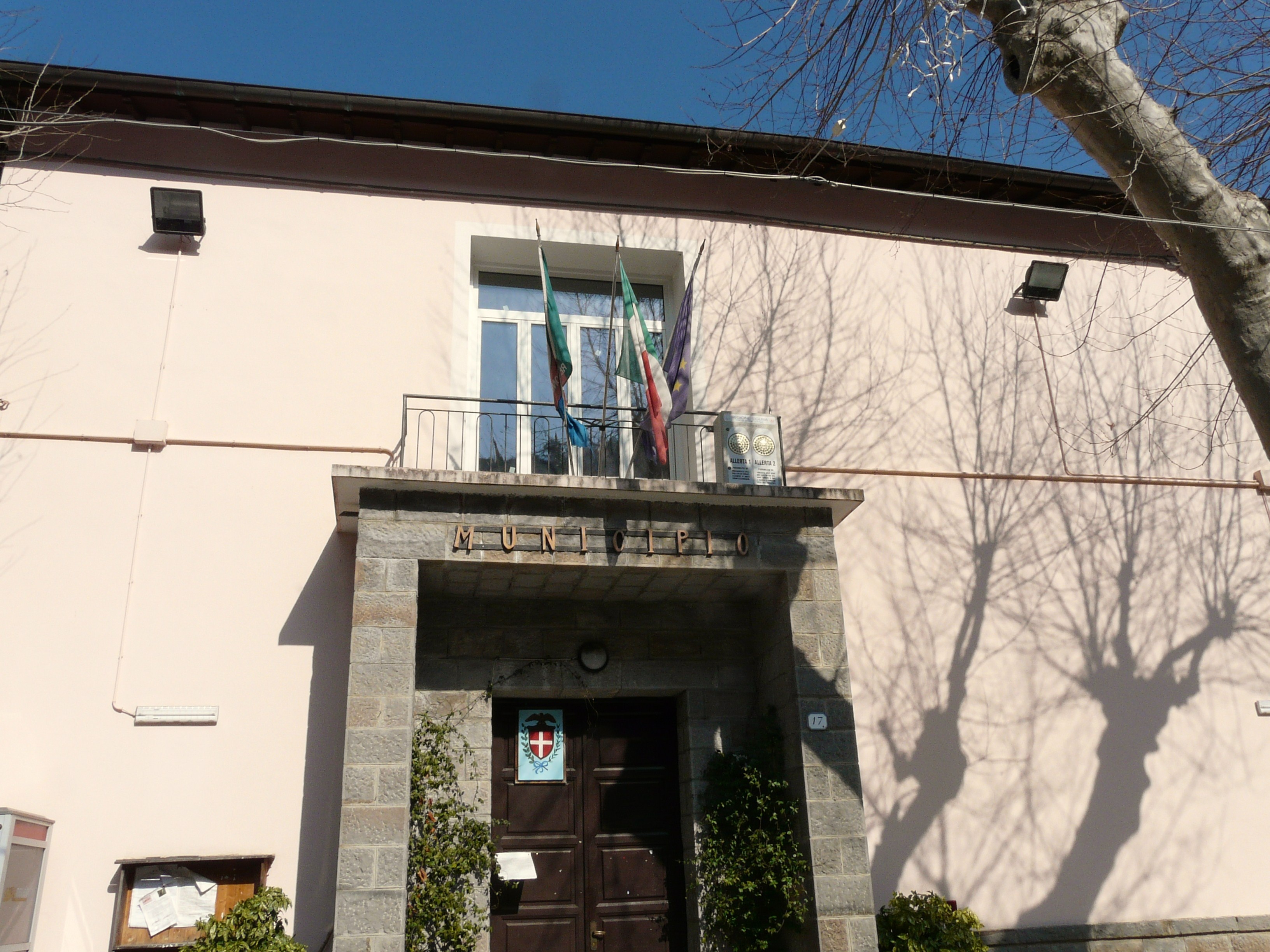 Municipio, Rocchetta Nervina, Liguria, Italia